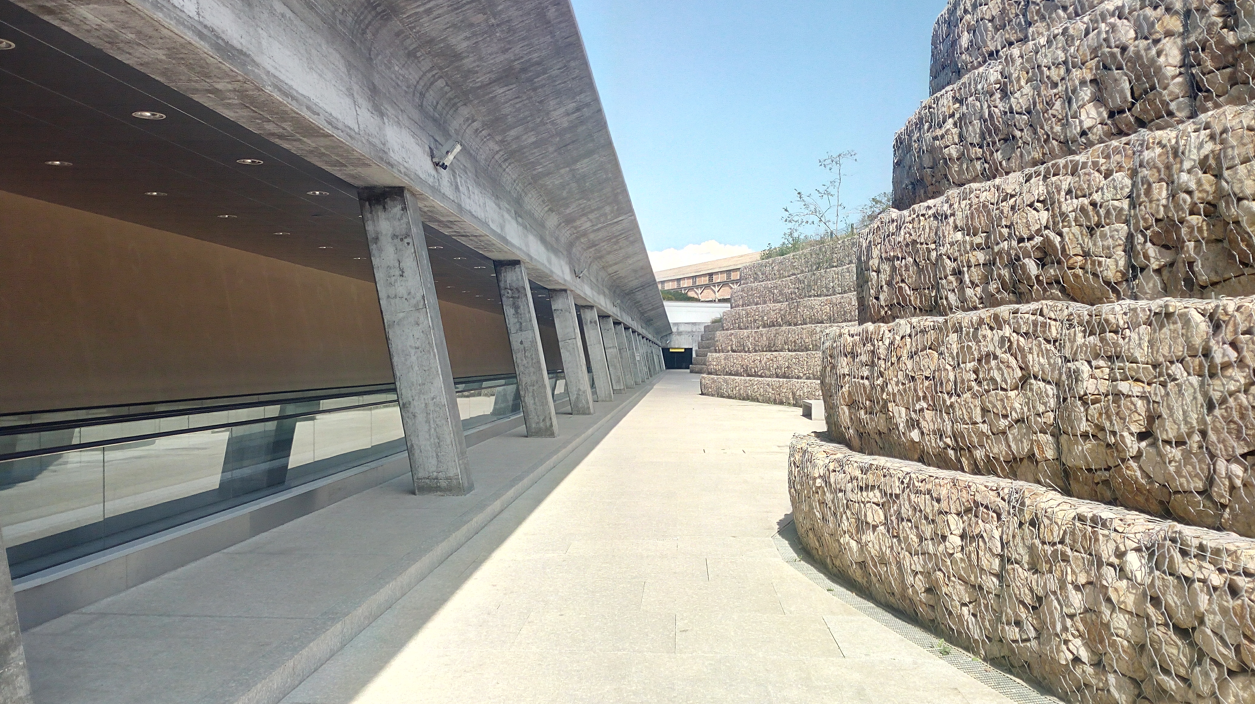 Il percorso tra l'aerostazione e la stazione ferroviaria di Elmas Aeroporto.